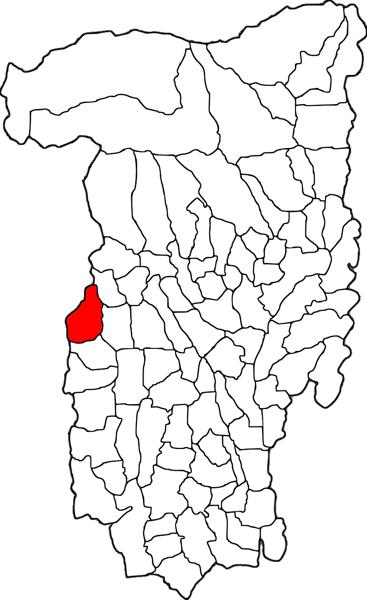 Lage der Gemeinde Alunu im Kreis Vâlcea (RO).